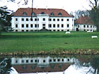 Moesgård